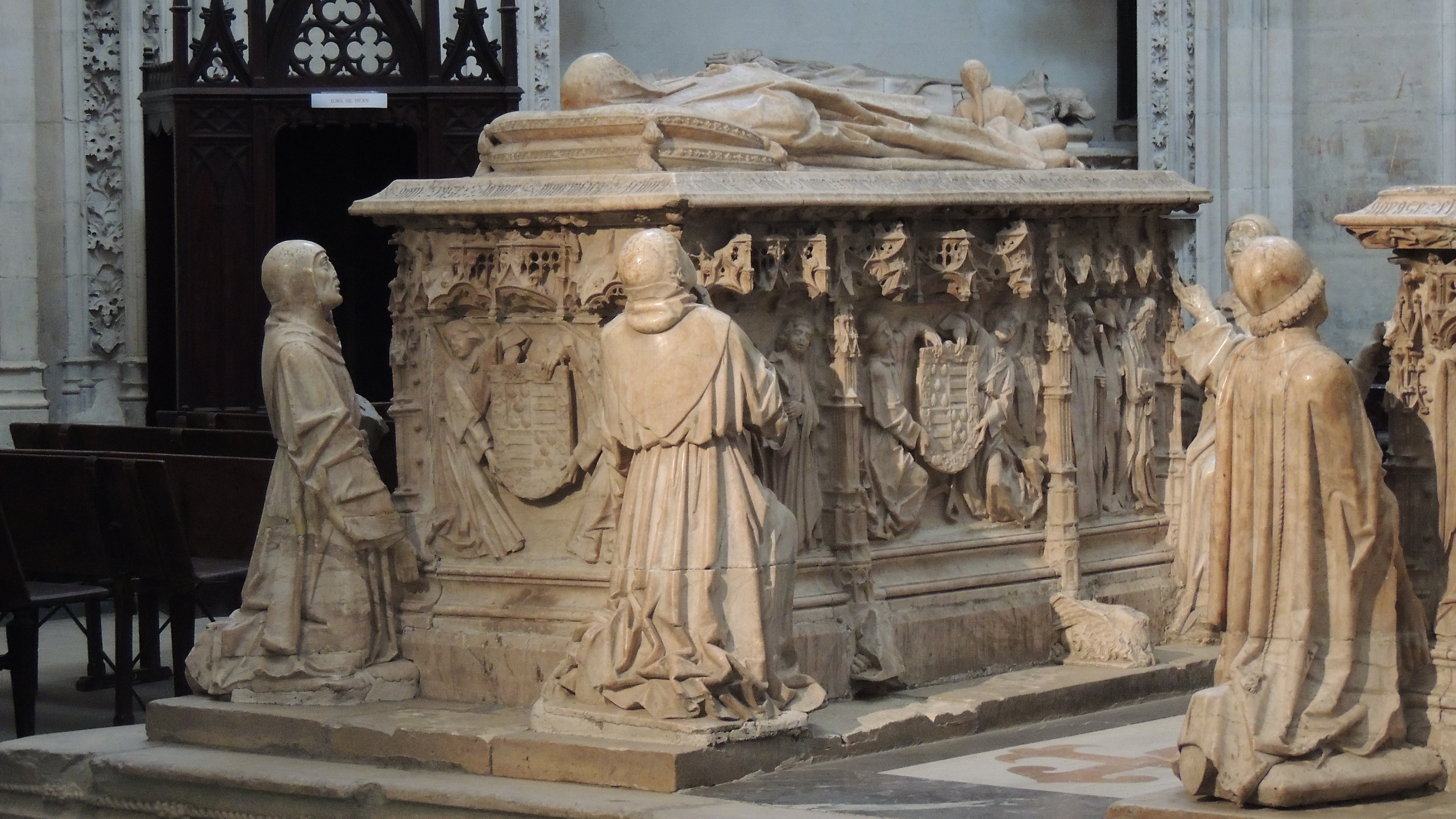 Sepulcro de la condesa Juana Pimentel († 1488), que fue la esposa del condestable Álvaro de Luna, en la capilla de Santiago de la catedral de Toledo, (España).